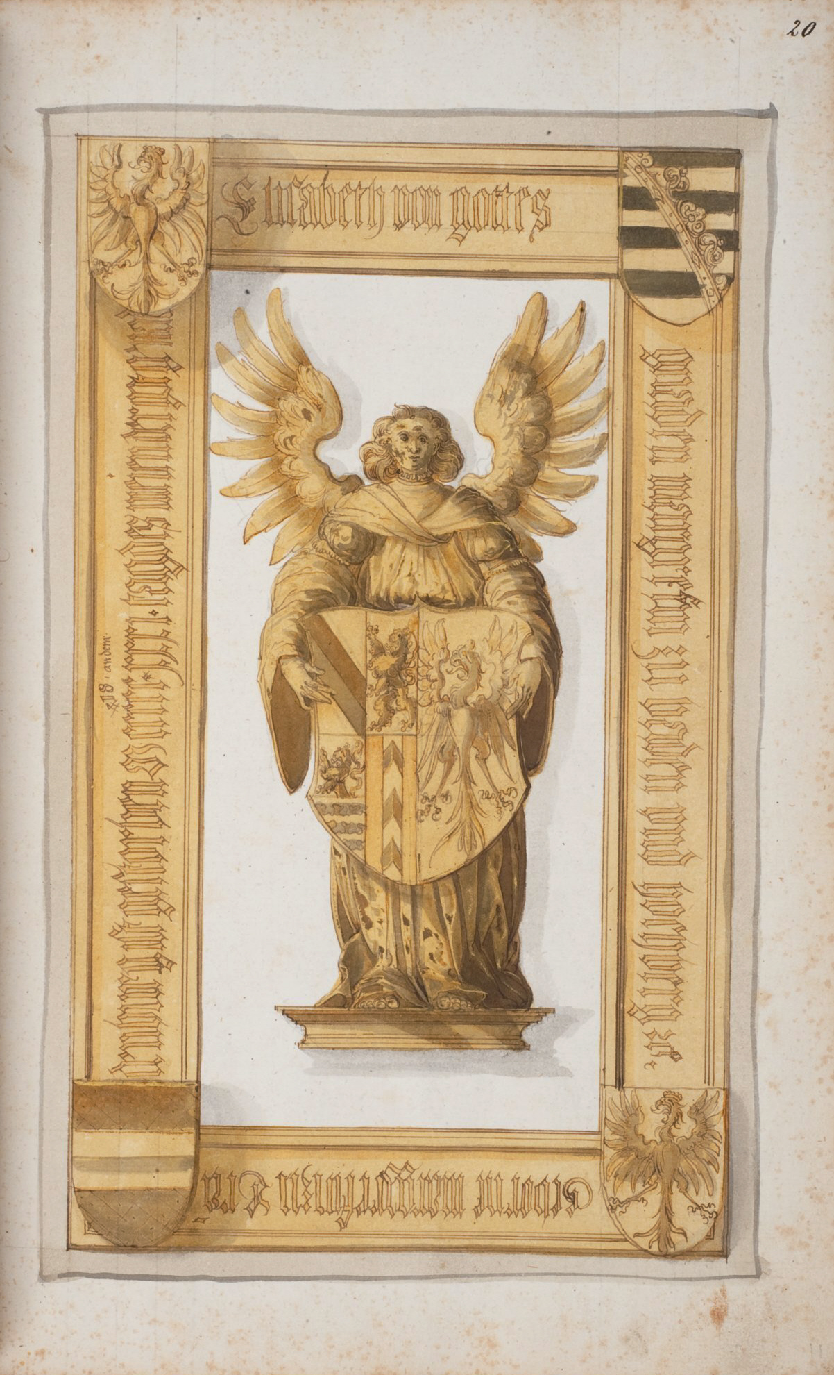 Memoriae posteritatique inclytae domus Wirtembergicae sacrum, 1583. (Nachbildungen alter Grabsteine des Württembergischen Fürstenhauses). Stuttgart, Württembergische Landesbibliothek, Cod.hist.fol.130 Elisabeth von Brandenburg-Ansbach-Kulmbach, Markgräfin von Baden († 1518), Beschreibung nach File:Steiner Memoriae domus Wirtembergicae 058.jpg: Elisabetha Marchionissa Brandeburgensis Friderici ex Sophia Poloniae Regina .F. Ernesti Marchionis Badensis Coniunx. O. XXXI. Maij. Anno. M.D.XVIII.